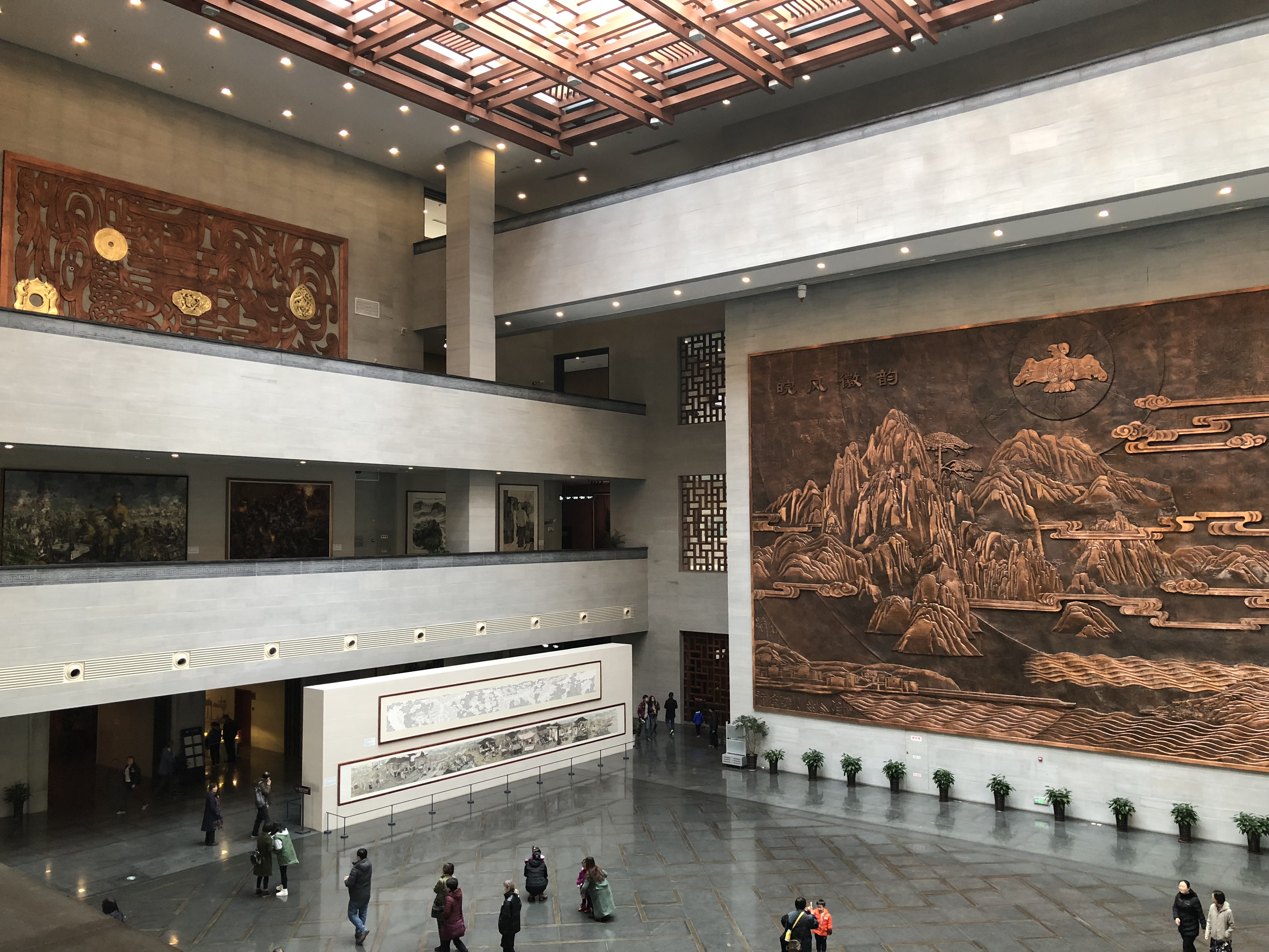 中文（中国大陆）: 安徽博物院中庭